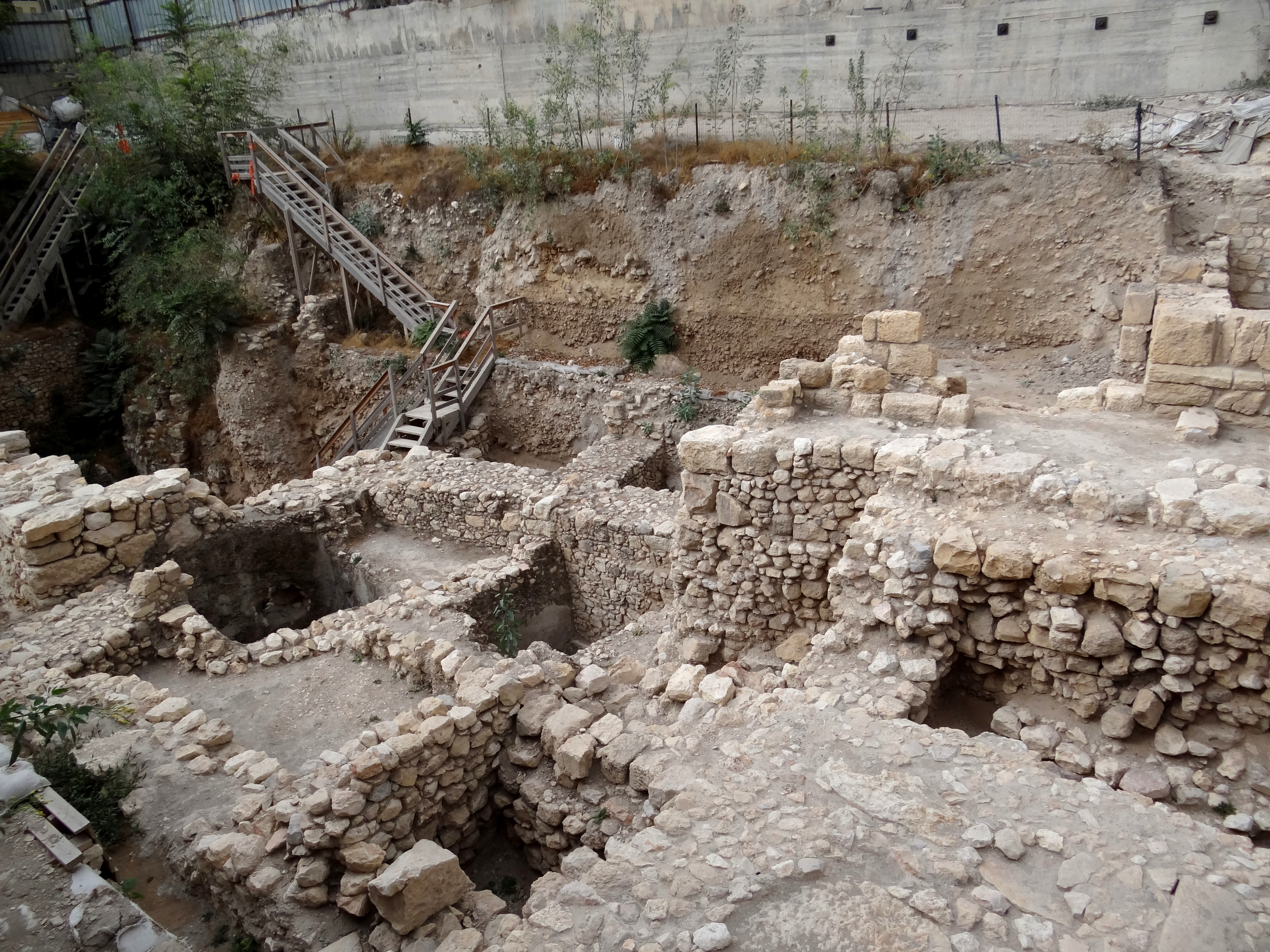 Excavation in City of David Givaty parking lot Jerusalem, Israe, status on October 12, 2011 חניון גבעתי בעיר דוד הינו חלק מהאתר הארכאולוגי עיר דוד. החפירות באתר זה החלו בחודש מרץ 2007. זו אחת מהחפירות הארכאולוגיות החשובות הנעשות בתחום עיר דוד שבשכונת סילואן בירושלים. הארכאולוגים האחראים הם דורון בן עמי ויאנה צ'חנוביץ תמונות שצולמו ב- 12 באוקטובר 2011 חצר הוילה וקומפלקס המקוואות של המבנה שנחרב בשנת 70